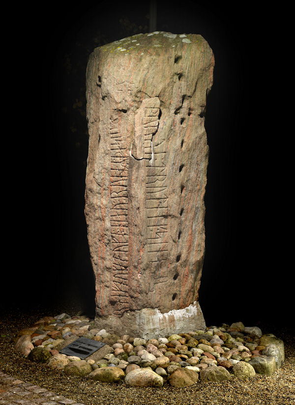 Foto: Nationalmuseet ved Roberto Fortuna